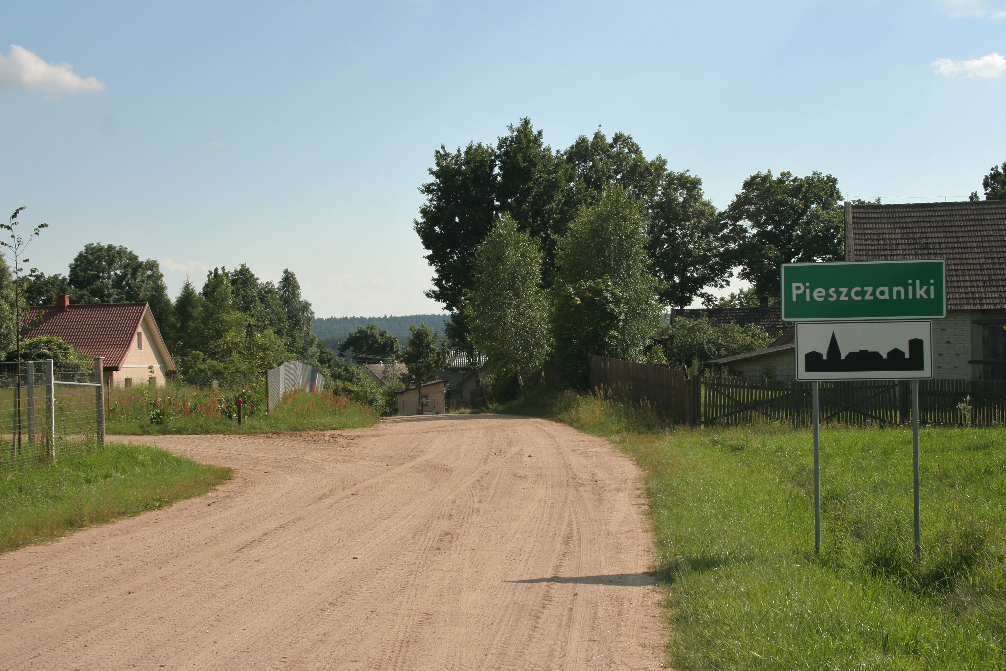 Droga wjazdowa do wsi Pieszczaniki.